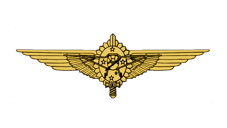 O brevê contém uma aeronave modelo L-4 PIPER CUB (empregada pela 1º Esquadrilha de Ligação e Observação na 2ª Guerra Mundial) sobreposta ao Brasão do Exército, e ambos sobrepostos a um par de asas.